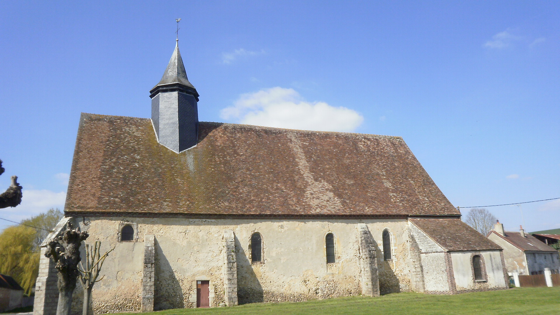 eglise Saint Maurice façade sud